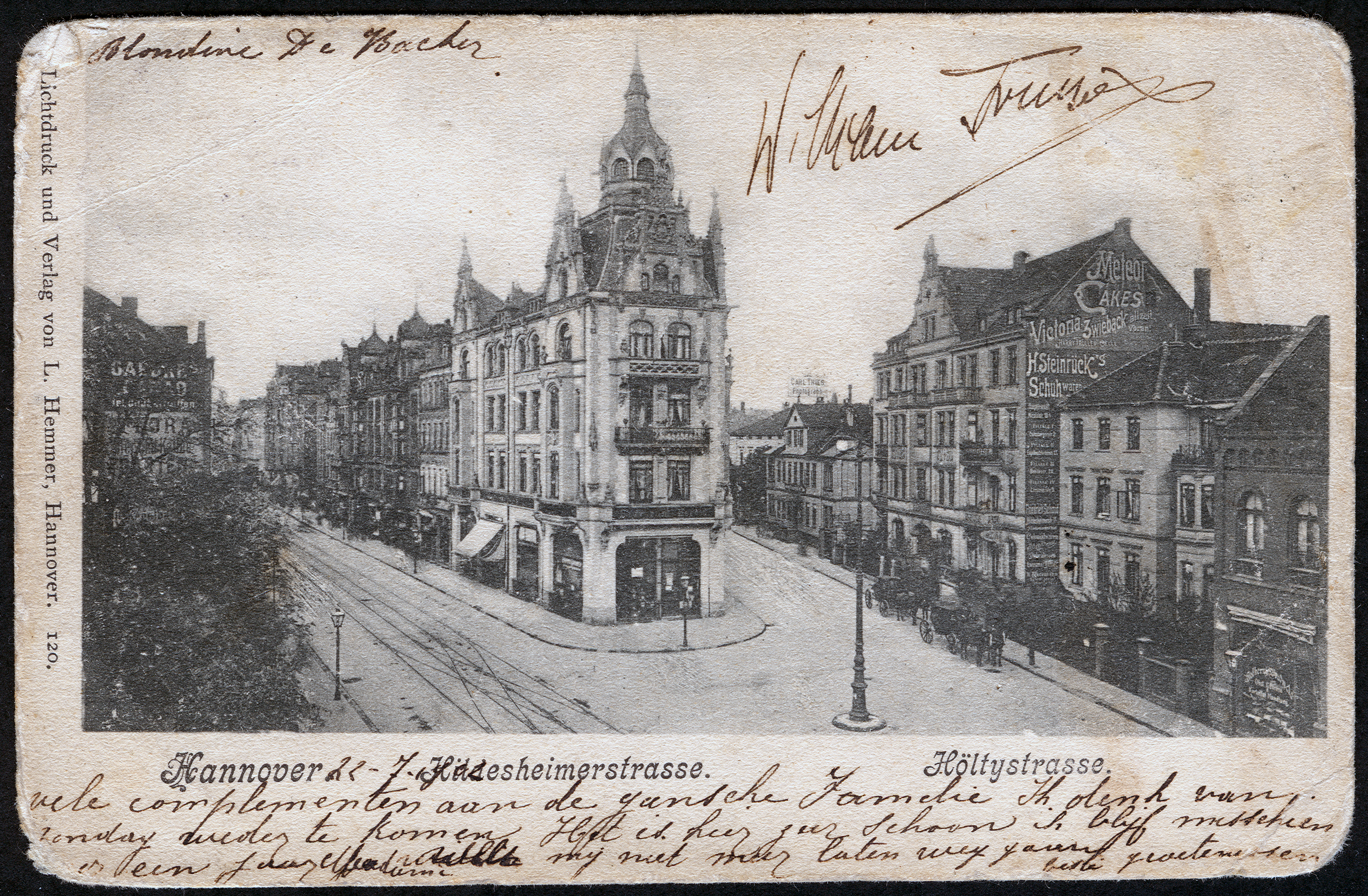 Ansichtskarte Nummer 120 von Ludwig Hemmer: Sie zeigt die Gabelung Hildesheimer Straße/Ecke Höltystraße, in der - in der Vergrößerung - das Atelierhaus des Fotografen Carl Thies zu sehen ist; auf dem Dach ein großes Schild mit dem Hinweis "Photograph". Der Besitzer des aus der Häuserflucht hervorspringenden Gebäudes auf der rechten Bildseite hat an der Brandmauer offenbar vollflächig Werbung von Betrieben anbringen lassen, wohl eine gute Nebeneinnahme um 1900. Zu lesen ist am Dach "Meteor Cakes, Victoria-Zwieback allzeit voran, Harry Trüller, Celle". Darunter: "H. Steinrück's Schuhwaren" mit Adressen der Filialen in Hannover. Weiter unten, auf dem Lichtdruck gerade noch zu erkennen: "Friedrich Schmidt, Hildesheimer Straße", und "Colonialwaren". Das Gebäude im Vordergrund links wurde 1931 ersetzt durch die von Stadtbaurat Karl Elkart errichtete Stadtbibliothek Hannover.